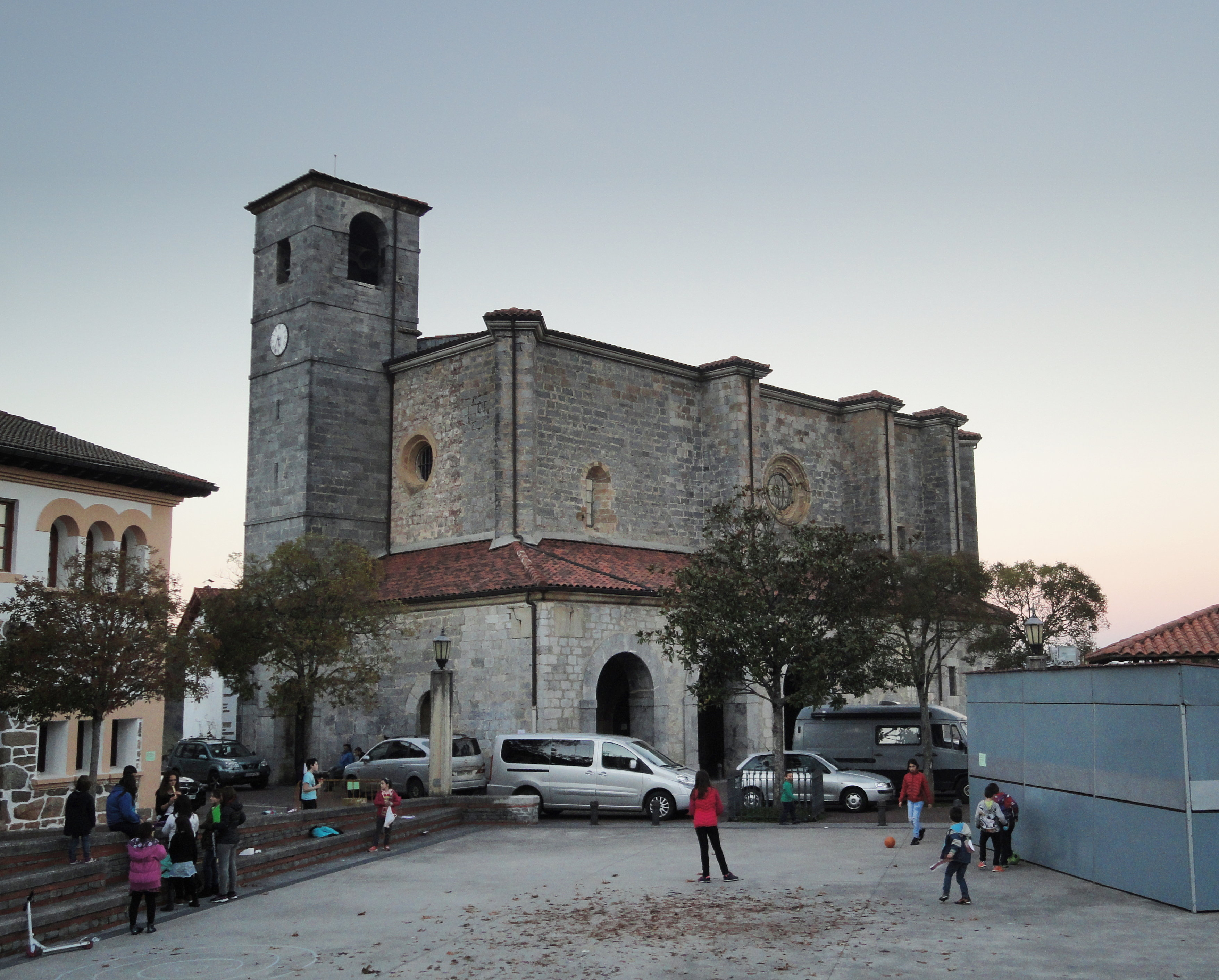 San Martin eliza - Alkiza